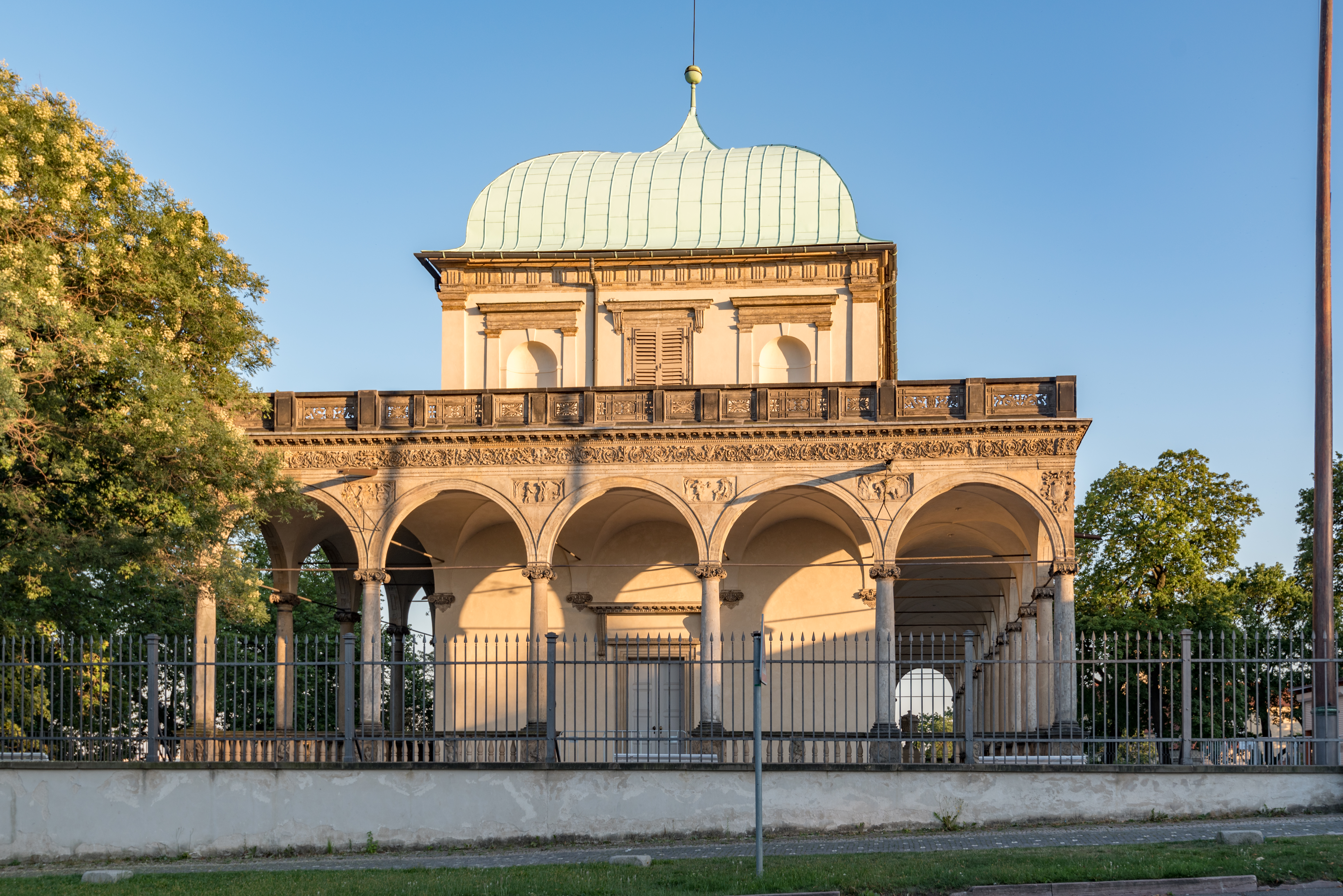 Praha 1, Pražský hrad, Královský letohrádek